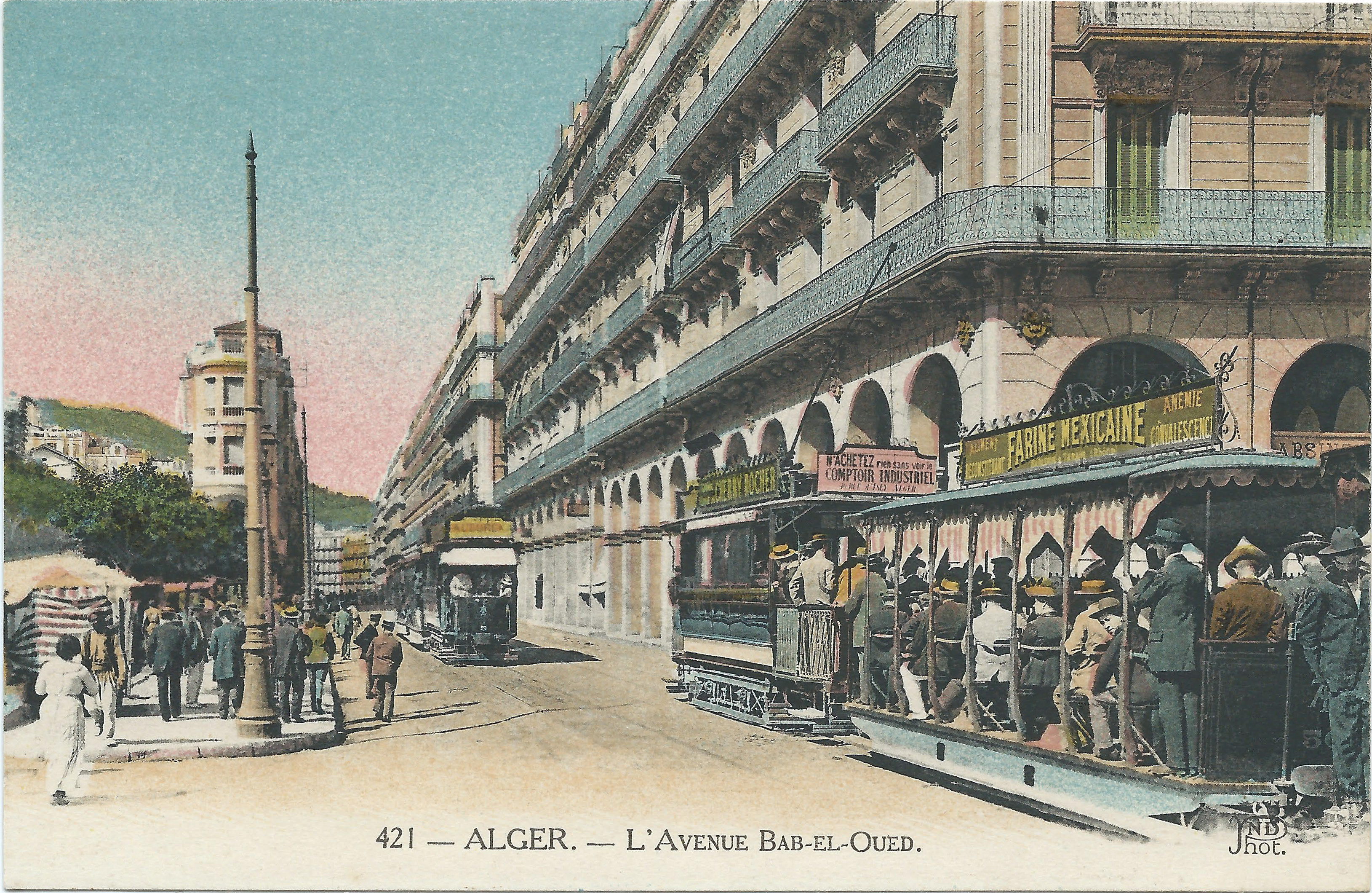 Briefkaart met trams in Algiers